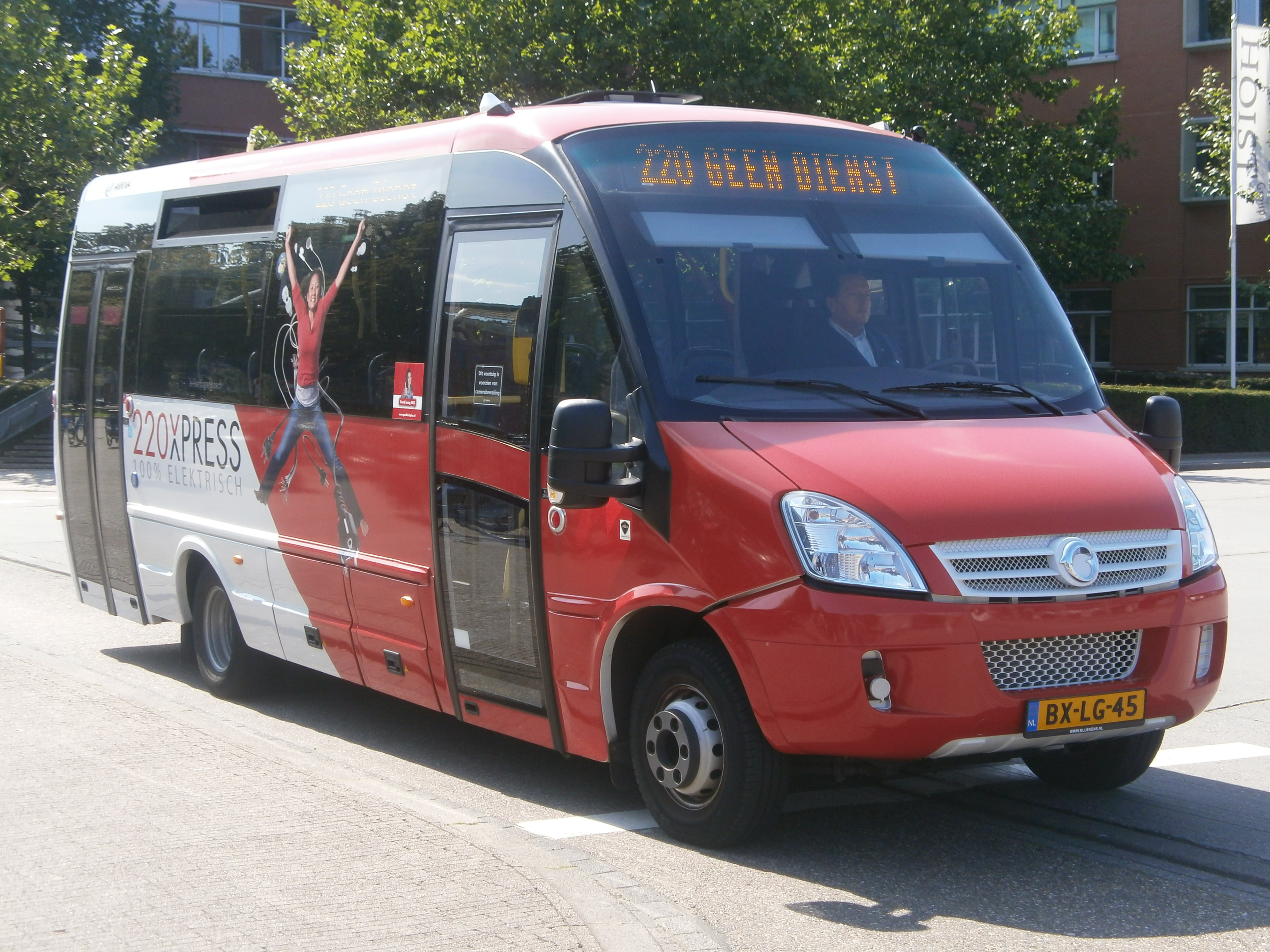 De Elektrische bus van het type Rošero First van Arriva die dienst doet op lijn 220 in 's-Hertogenbosch (220Xpress)